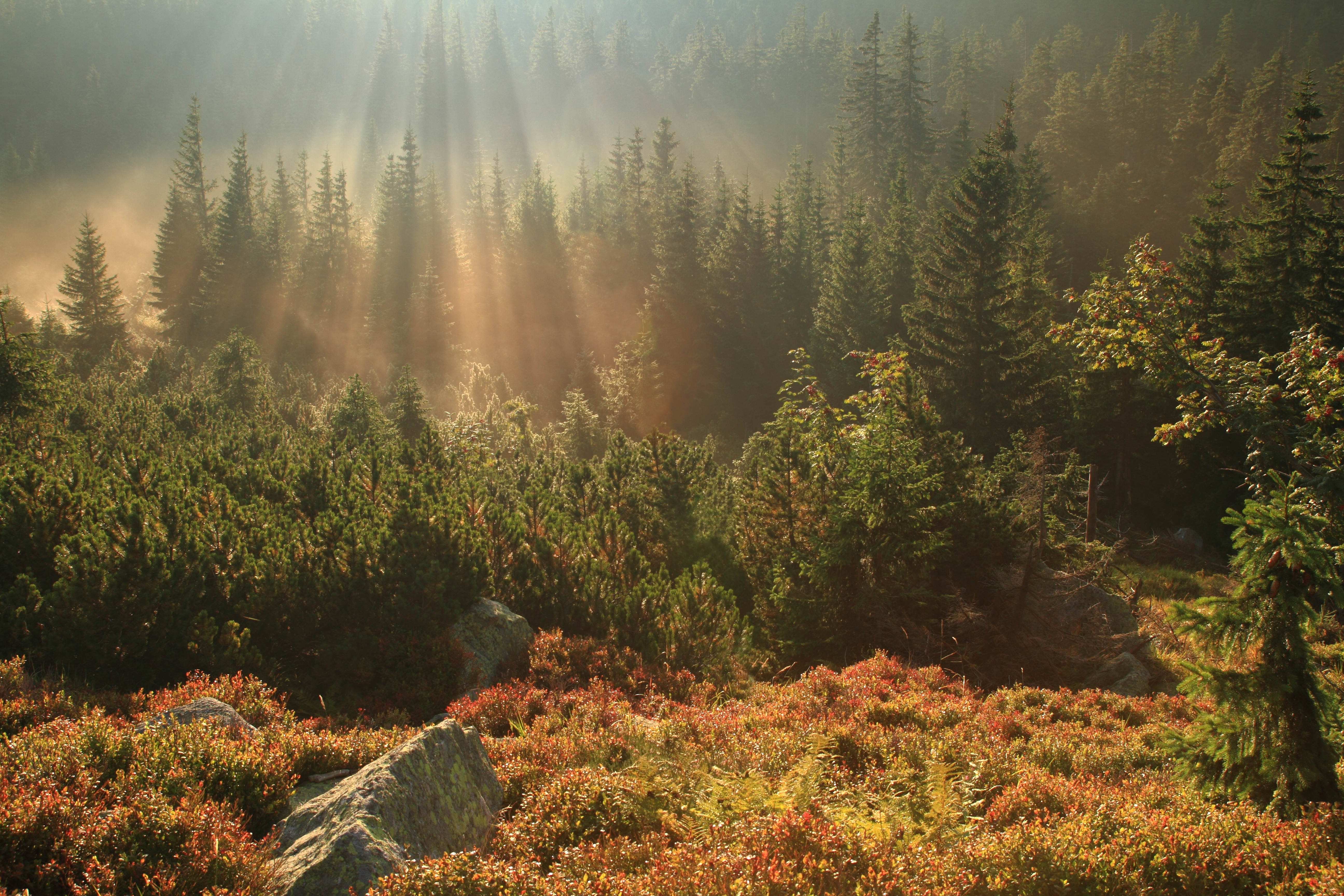 Obszar specjalnej ochrony ptaków Karkonosze. This is a photography of Natura 2000 protected area with ID PLB020007